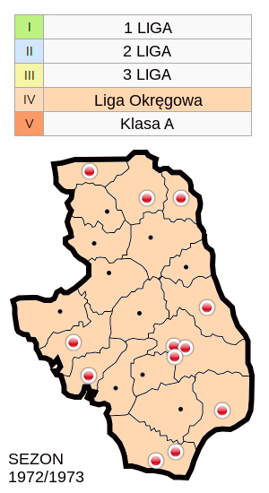 Jagiellonia w sezonie 1972/73- mapa klubów